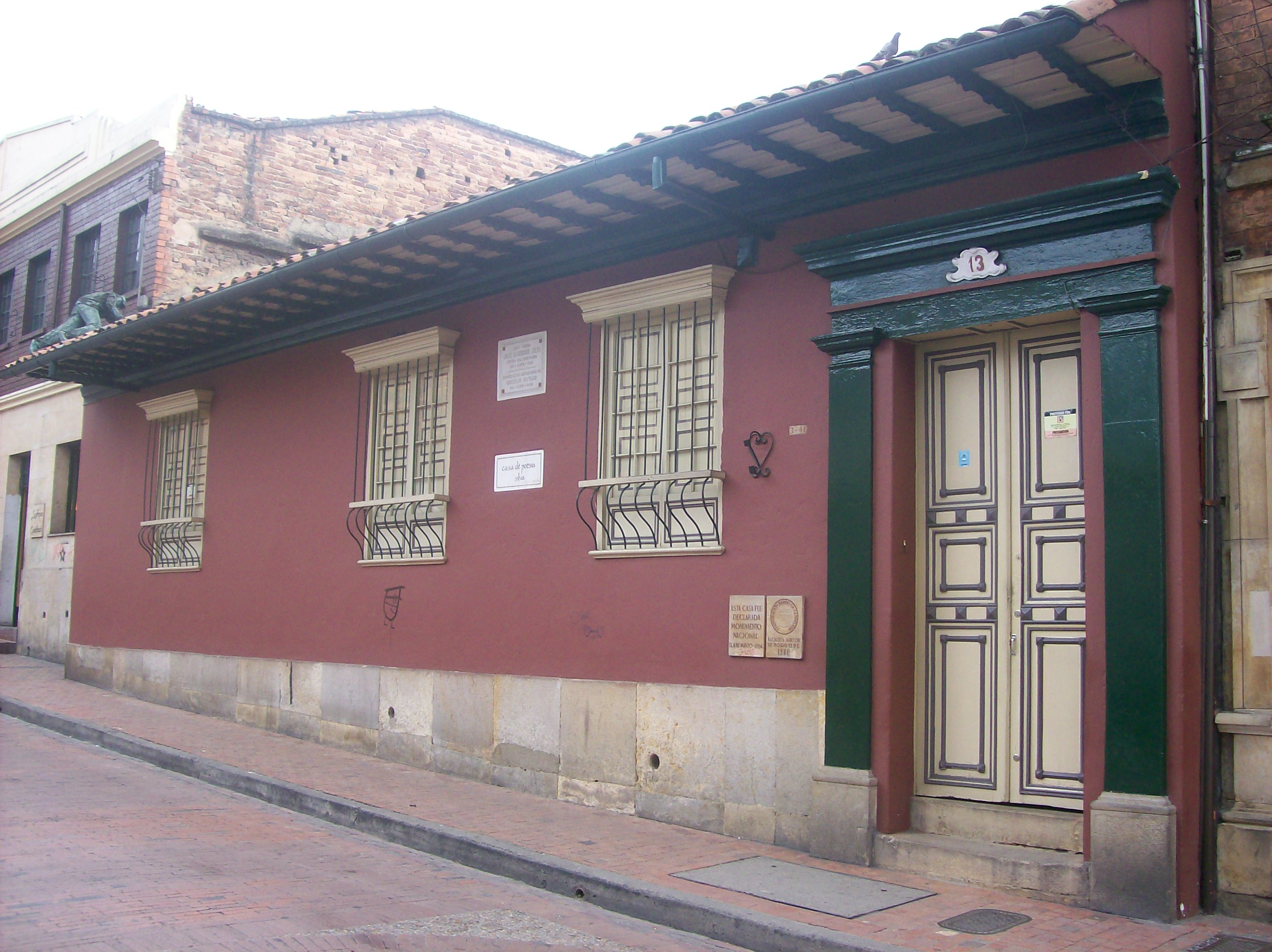 Casa de José Asunción Silva, en Bogotá